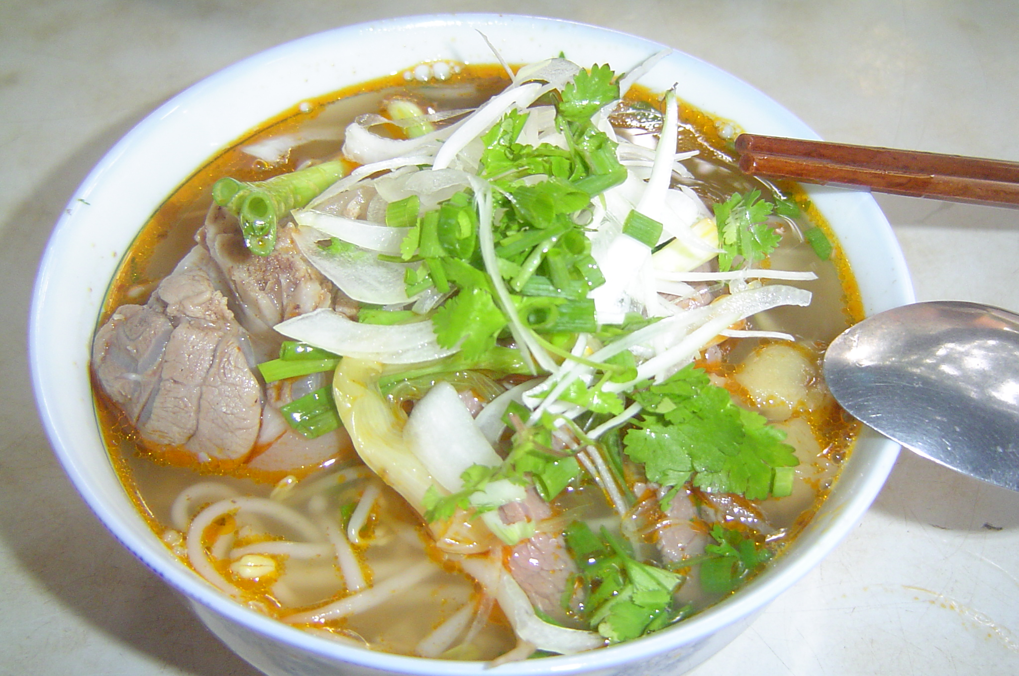 Hình do người truyền lên chụp, hiến cho wiki.